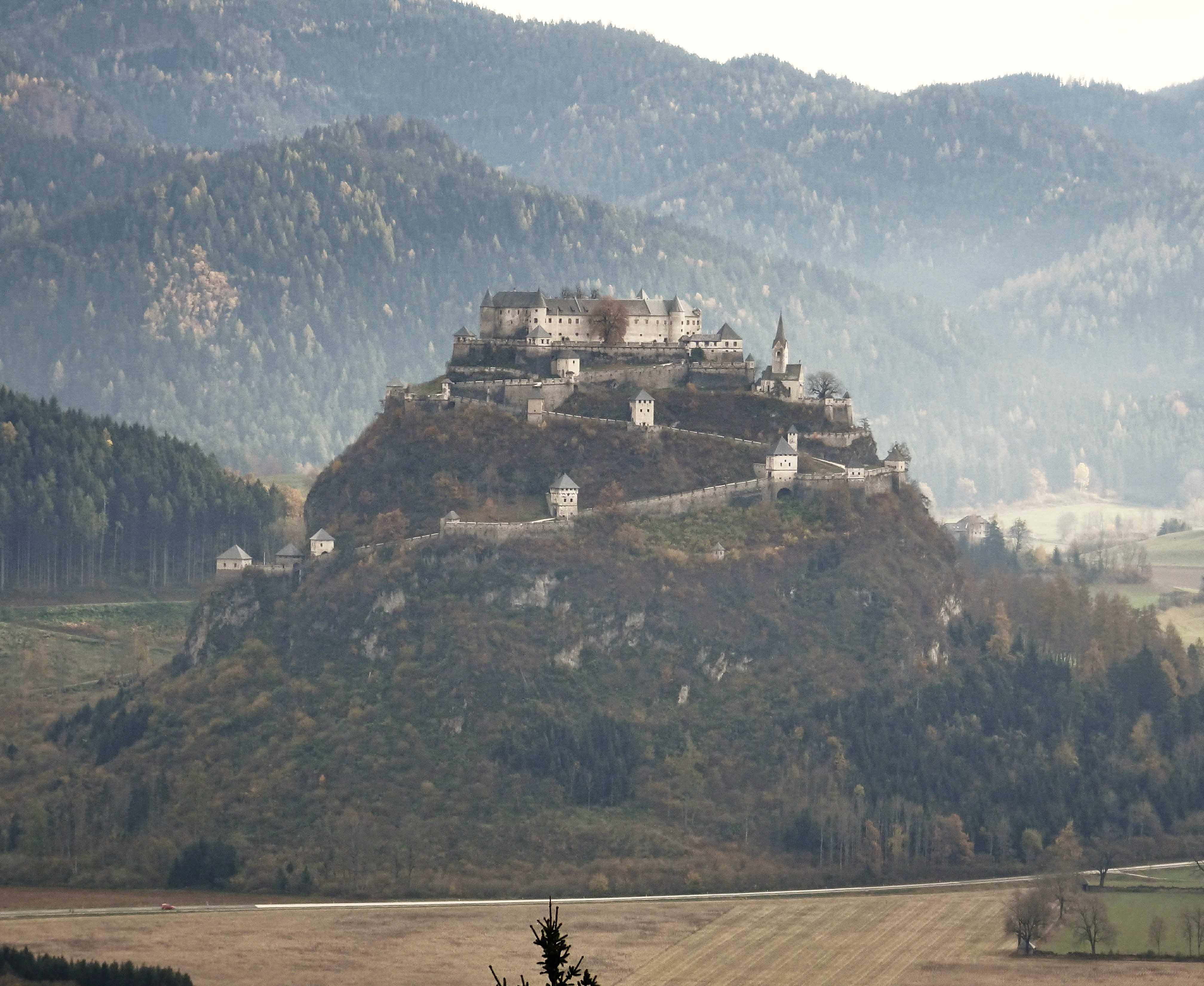 Burg Hochosterwitz, Lage- und Gesamtansicht